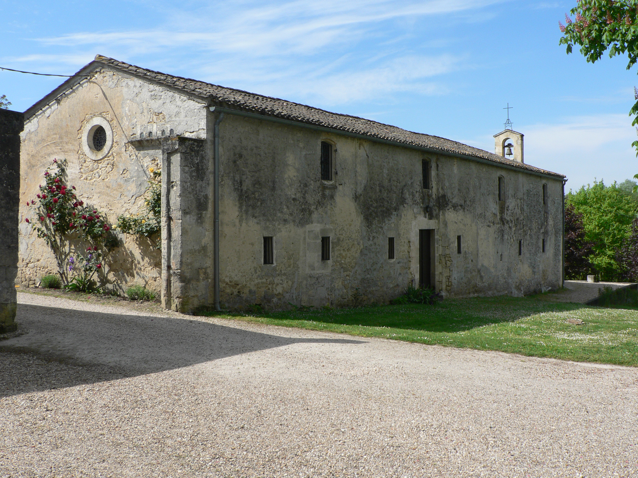 Chapel of Castle of Pommiers at Vérac in France